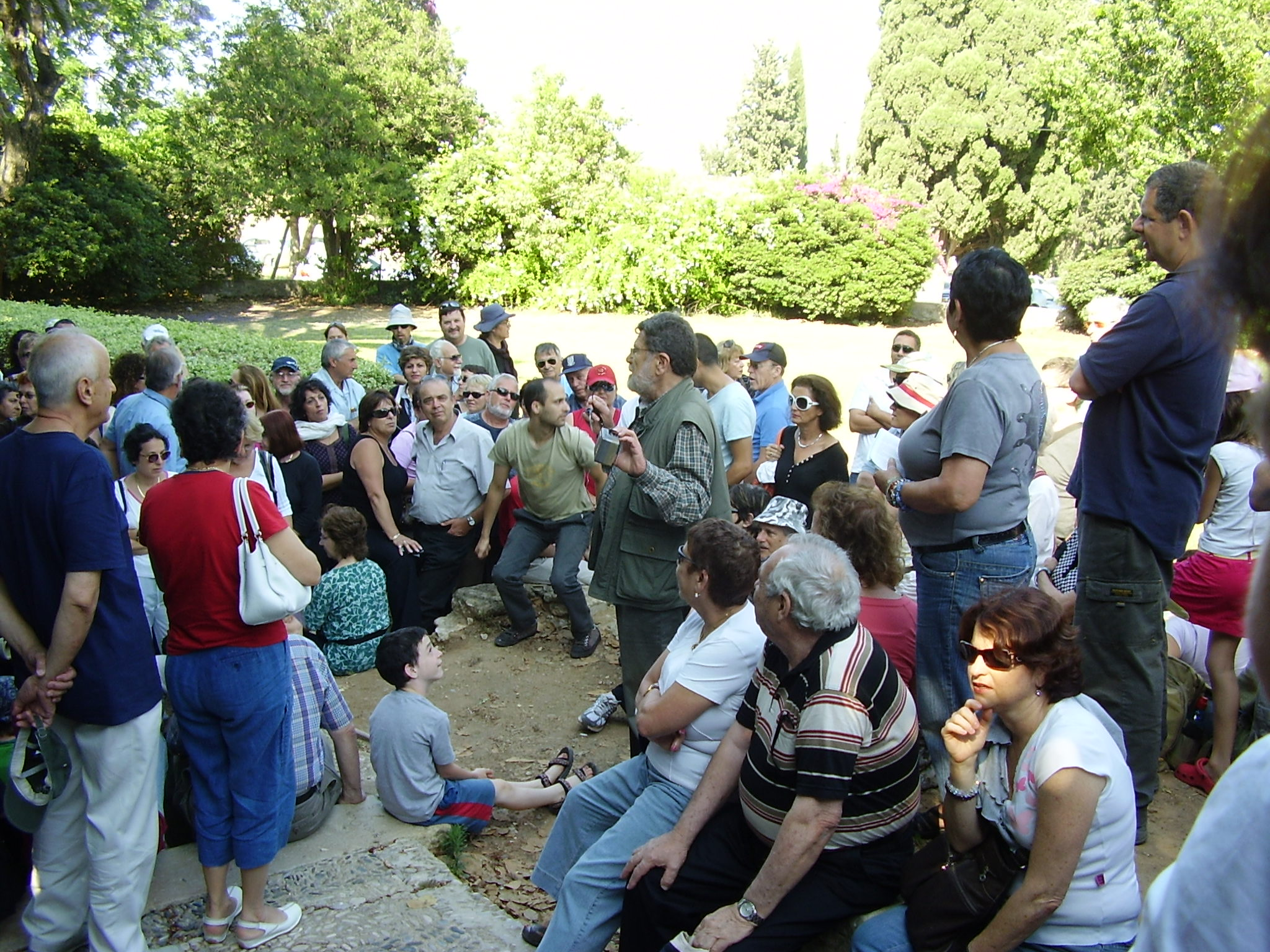 סעדיה מנדל מדריך מטיילים במקווה ישראל